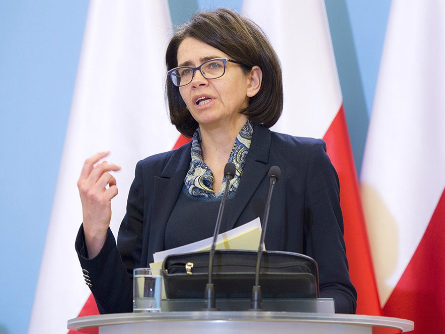 Anna Streżyńska, prawniczka i urzędniczka państwowa.